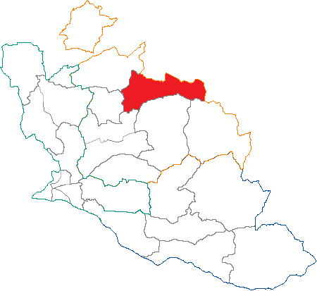 Situation du canton dans le département de Vaucluse (France)